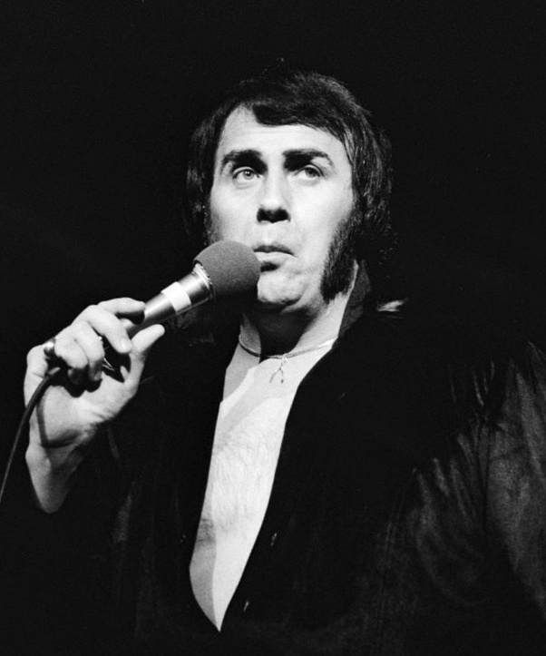 Engelse zangers David Ballard, Bo Wills, Vince Eager geven uitvoeringen van musical "" Elvis" in stadsschouwburg Amsterdam. Vince Eager als de "oude" Elvis tijdens de generale repetitie